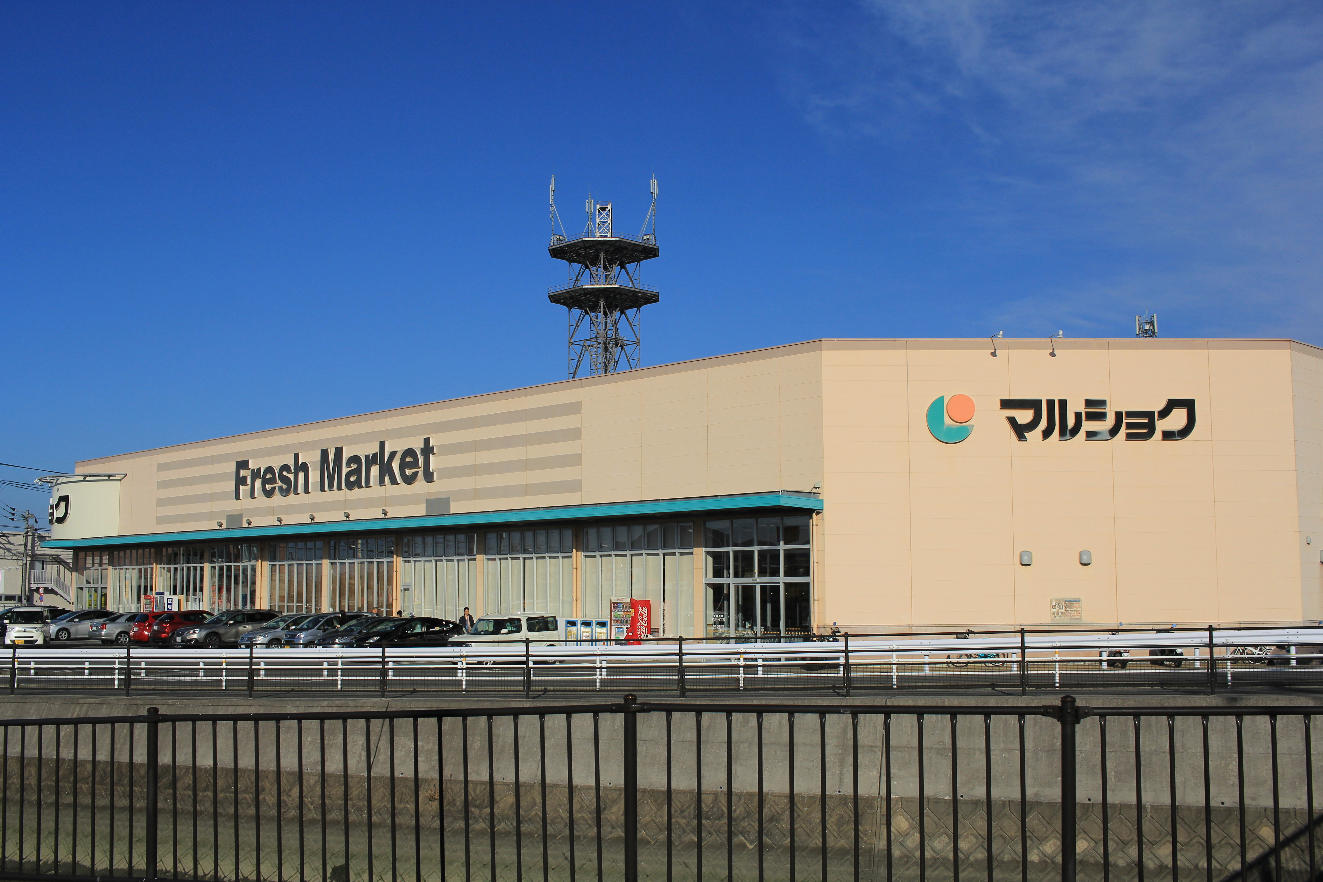 マルショク今宿店 Canon EOS 60D